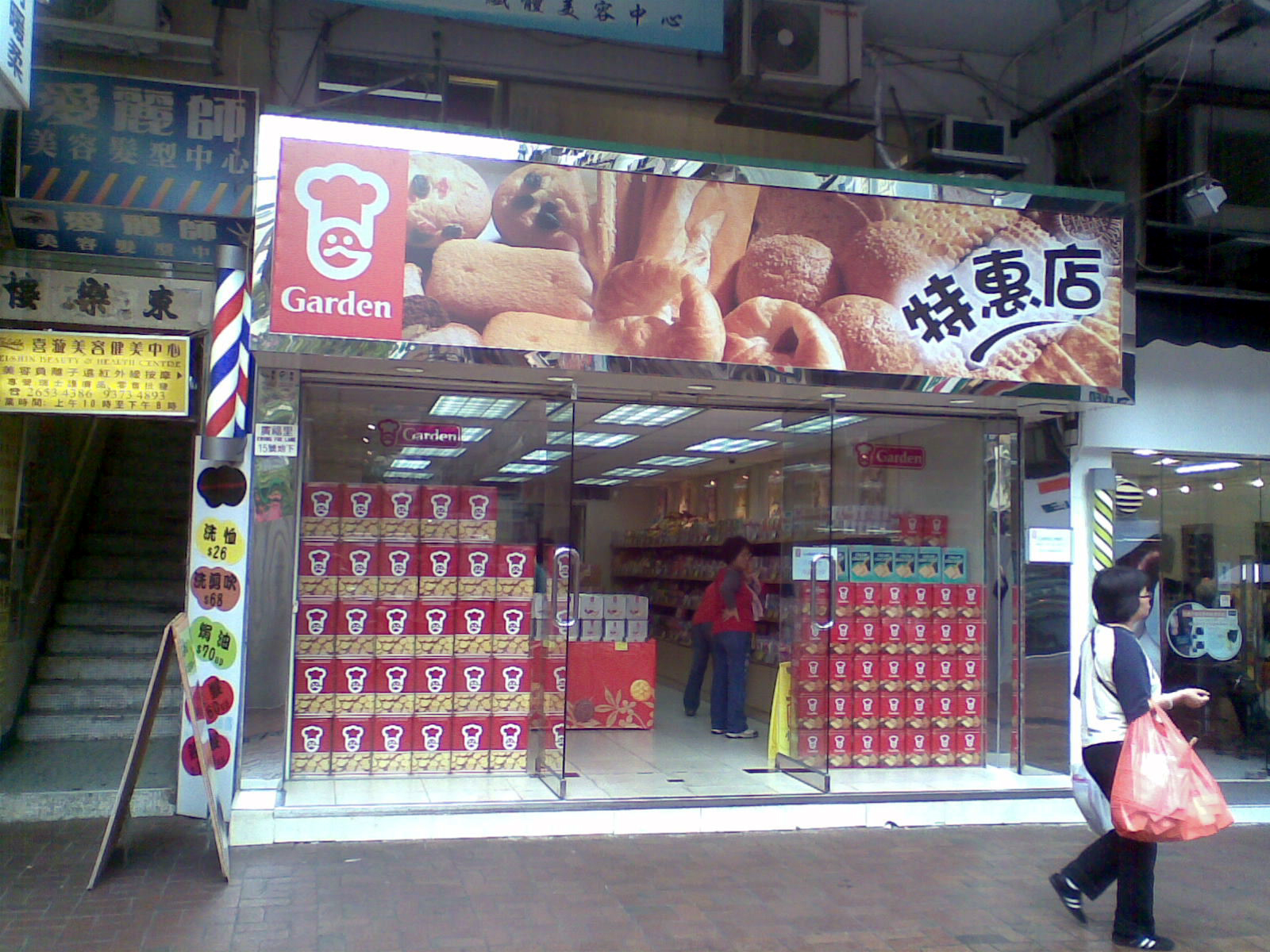 嘉頓特惠店